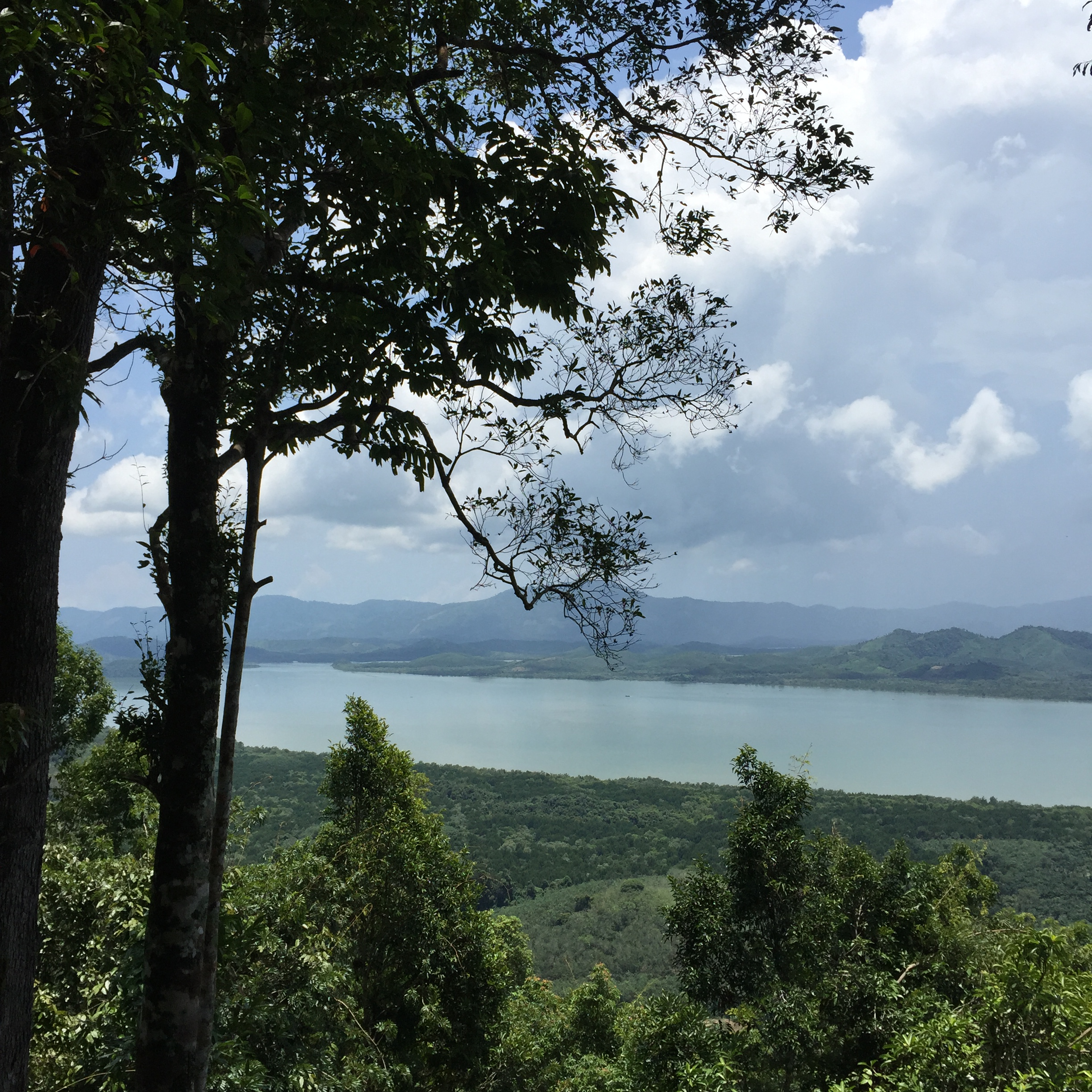 Bang Kaeo, La-un District, Ranong, Thailand